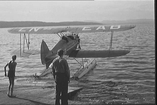 Widerøe Waco RNF at Ingierstand in Oppegård